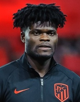 Il giocatore ghanese Thomas Partey prima della partita con la Lokomotiv Mosca